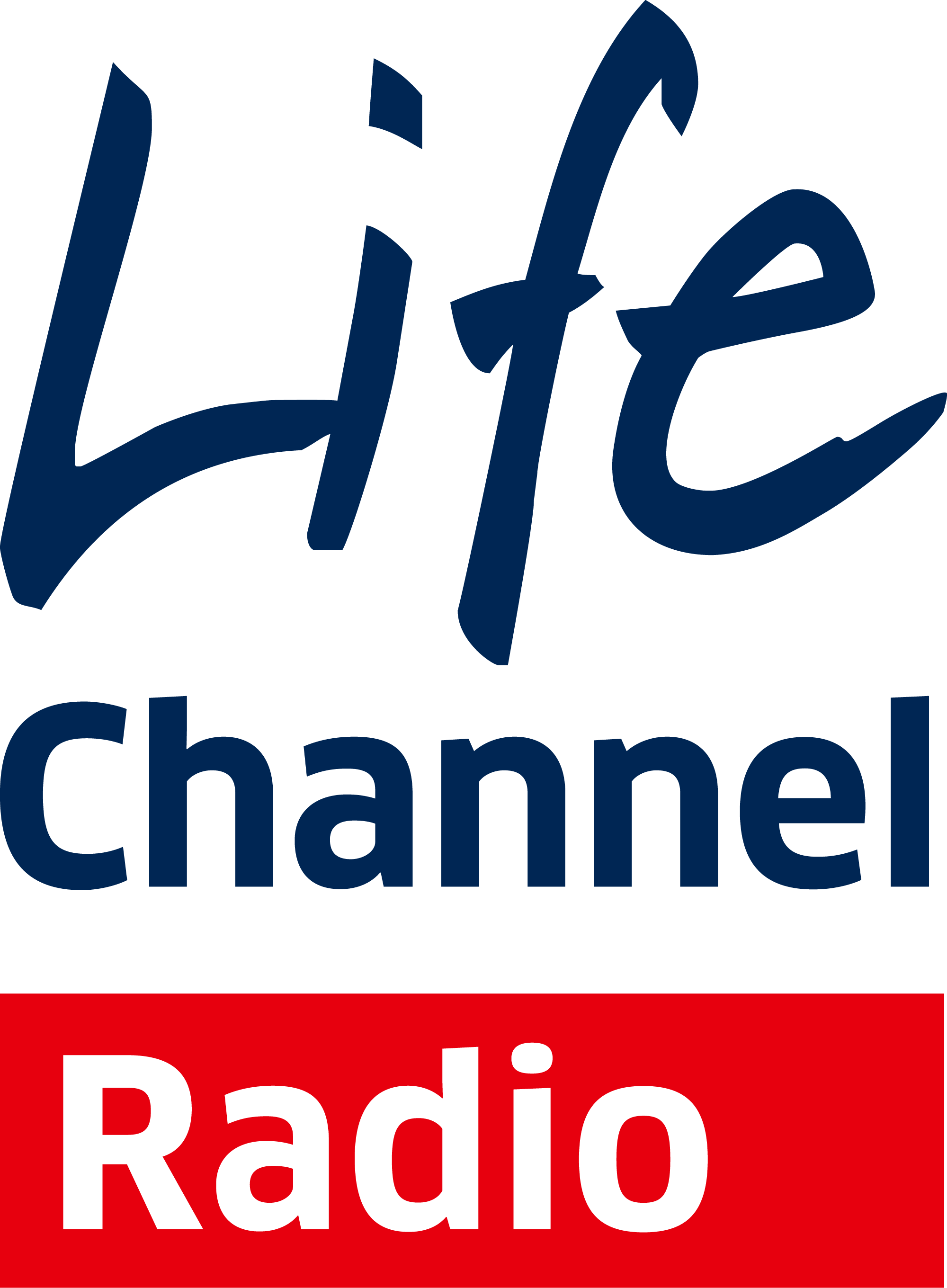 Logo von Radio Life Channel